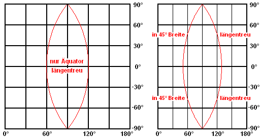 Plattkarte als einfachstes Kartennetz selbst gezeichnet, Geof 07:54, 14. Nov. 2006 (CET)